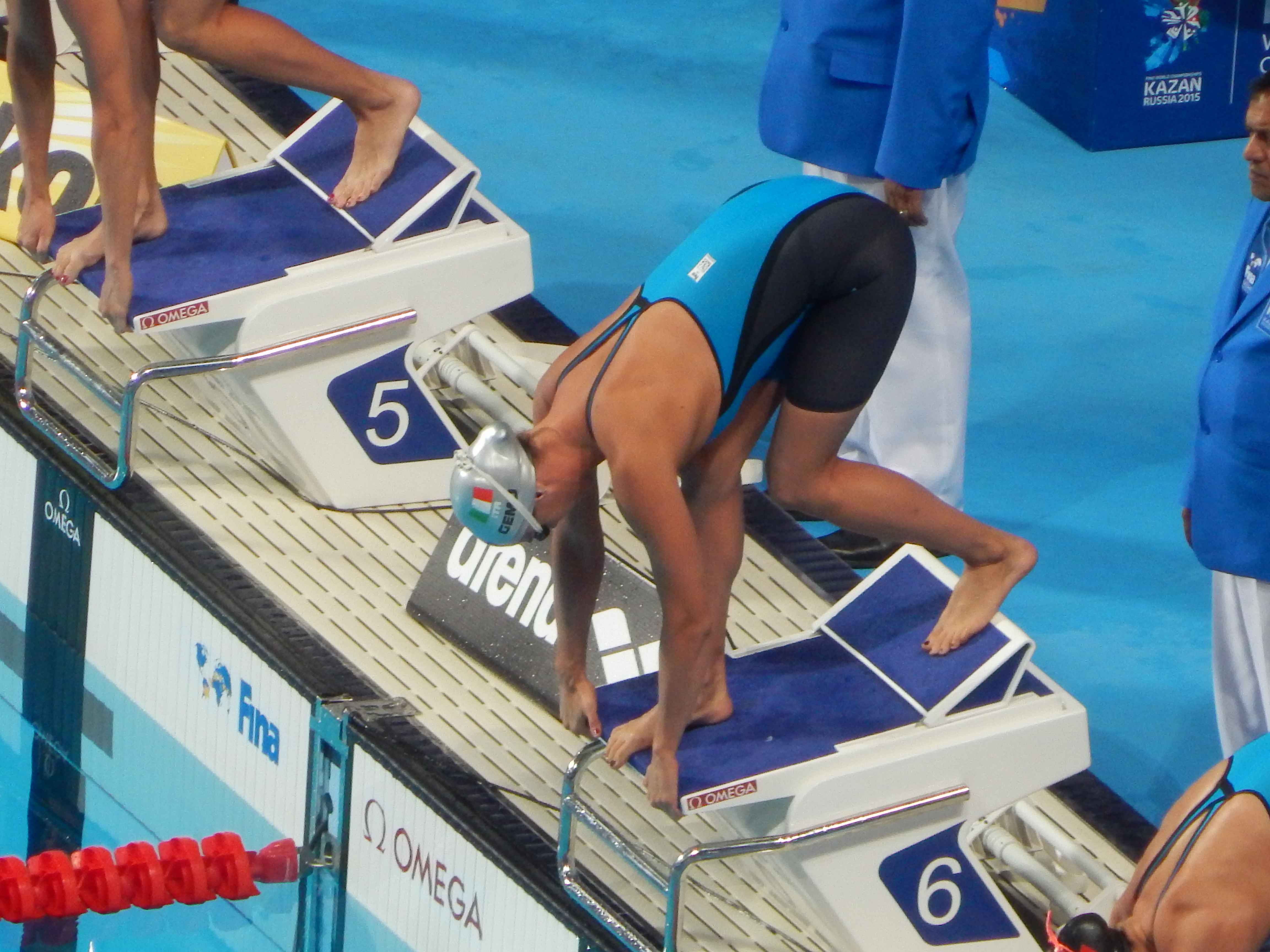 Заплыв на чемпионате мира в Казани баттерфляем 50 метров полуфинал